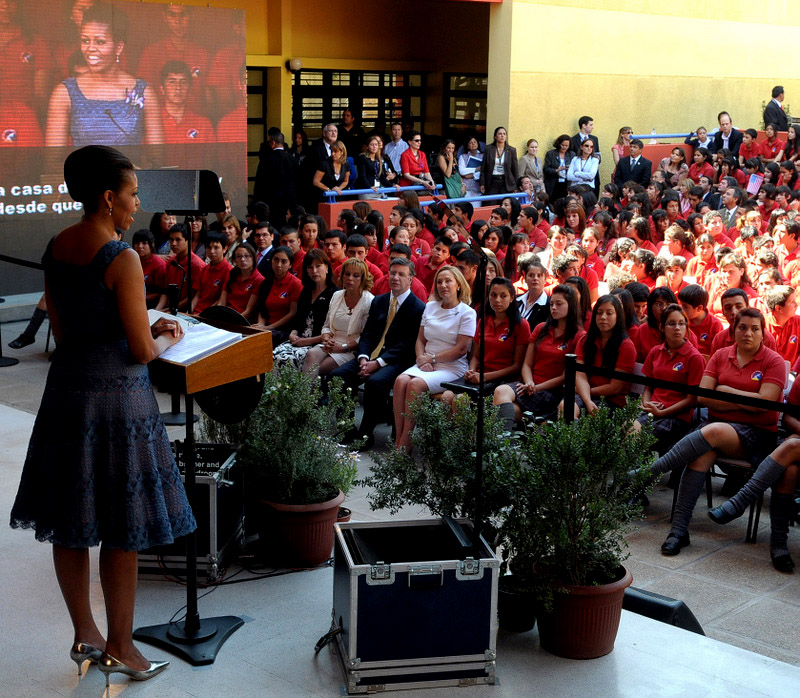 Primeras damas en Liceo de Excelencia de Renca